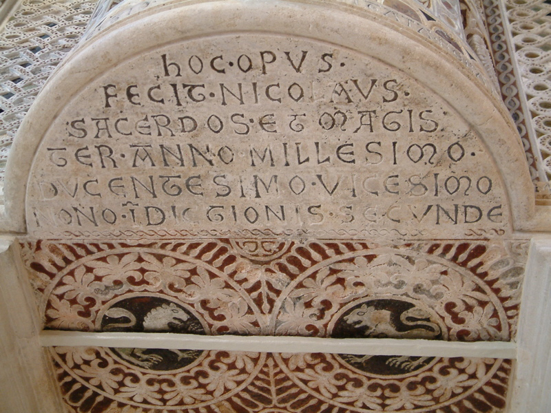 Inschrift vom Ambo der Kathedrale von Bitonto: "Hoc opus fecit Nicolaus sacerdos et magister anno millesimo ducentesimo vigesimo nono i[n]dictionis secunda"